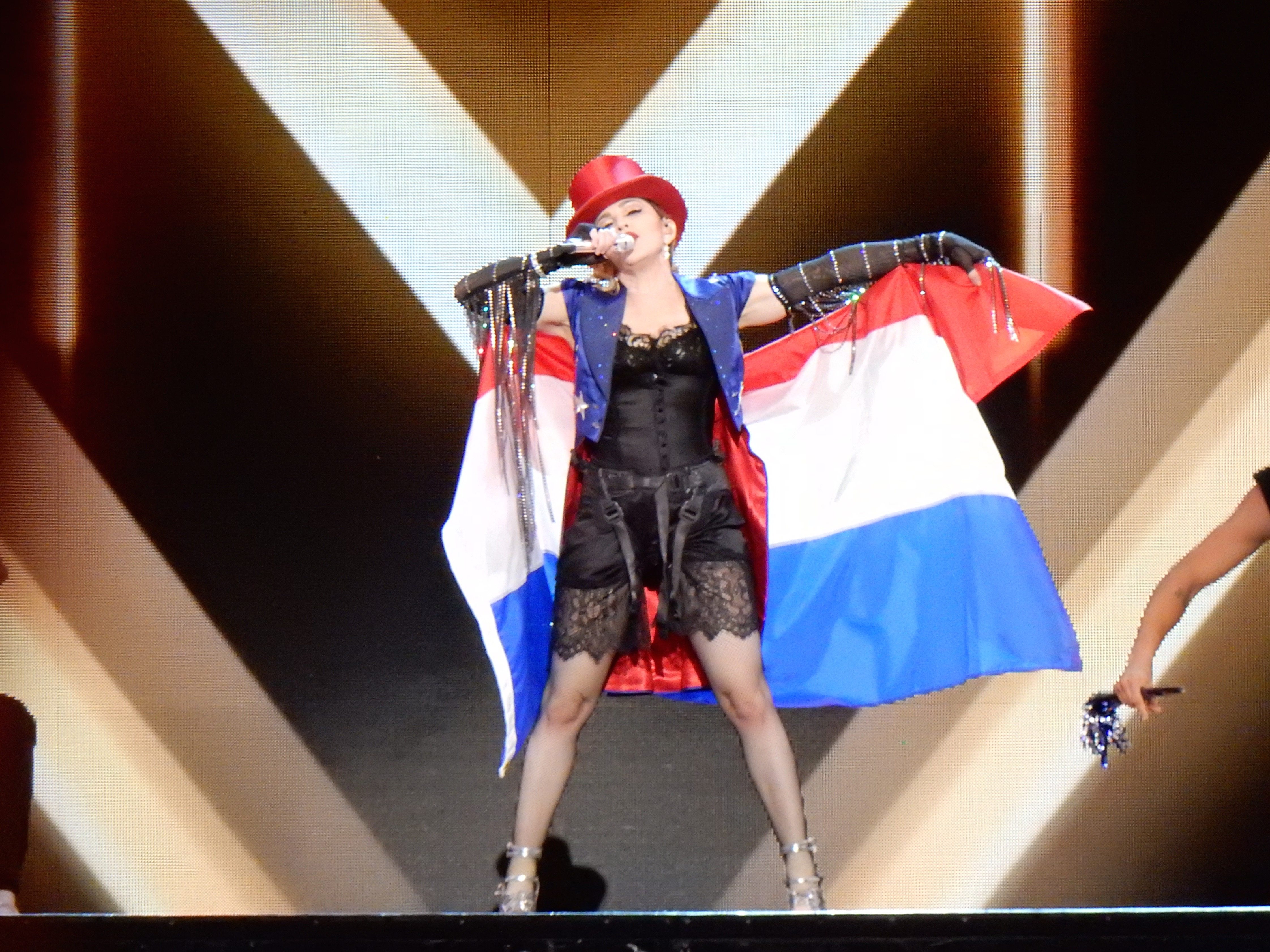 Madonna Rebel Heart Tour 2015 - Amsterdam 2